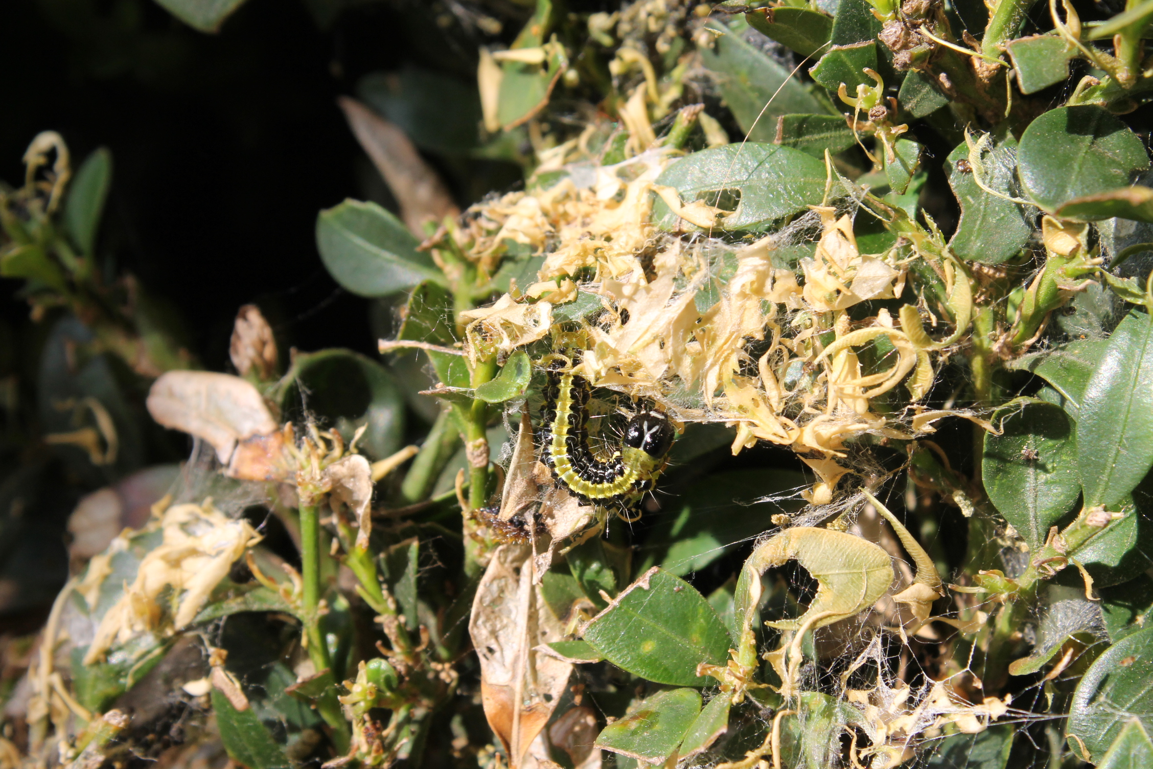 Cydalima perspectalis na zimostrázu Buxus sempervirens , Brno Komín, Czech republic, invasive insect.